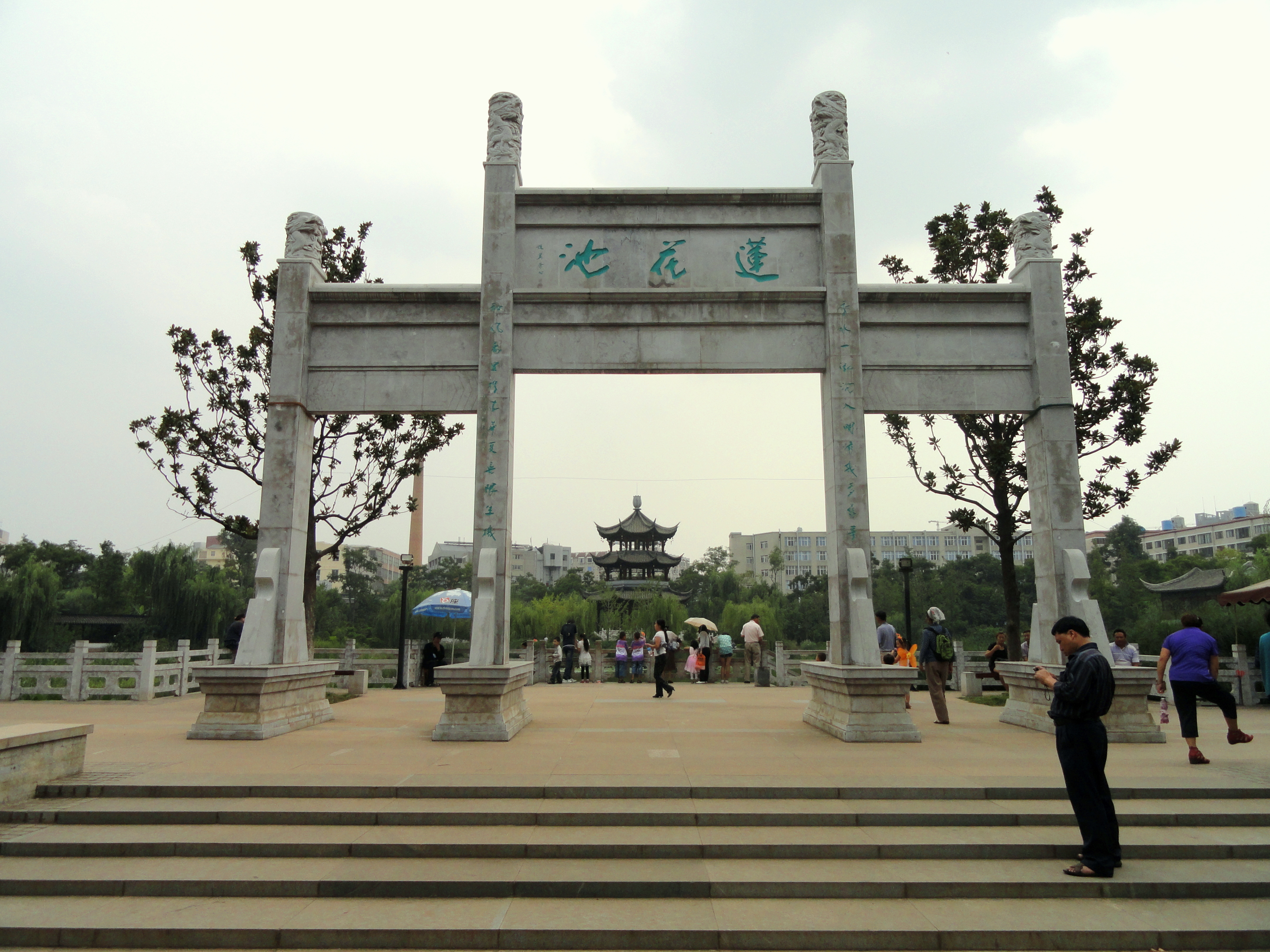 Lianhuachi Park (莲花池), Minyuan Road, Kunming, Yunnan, China.